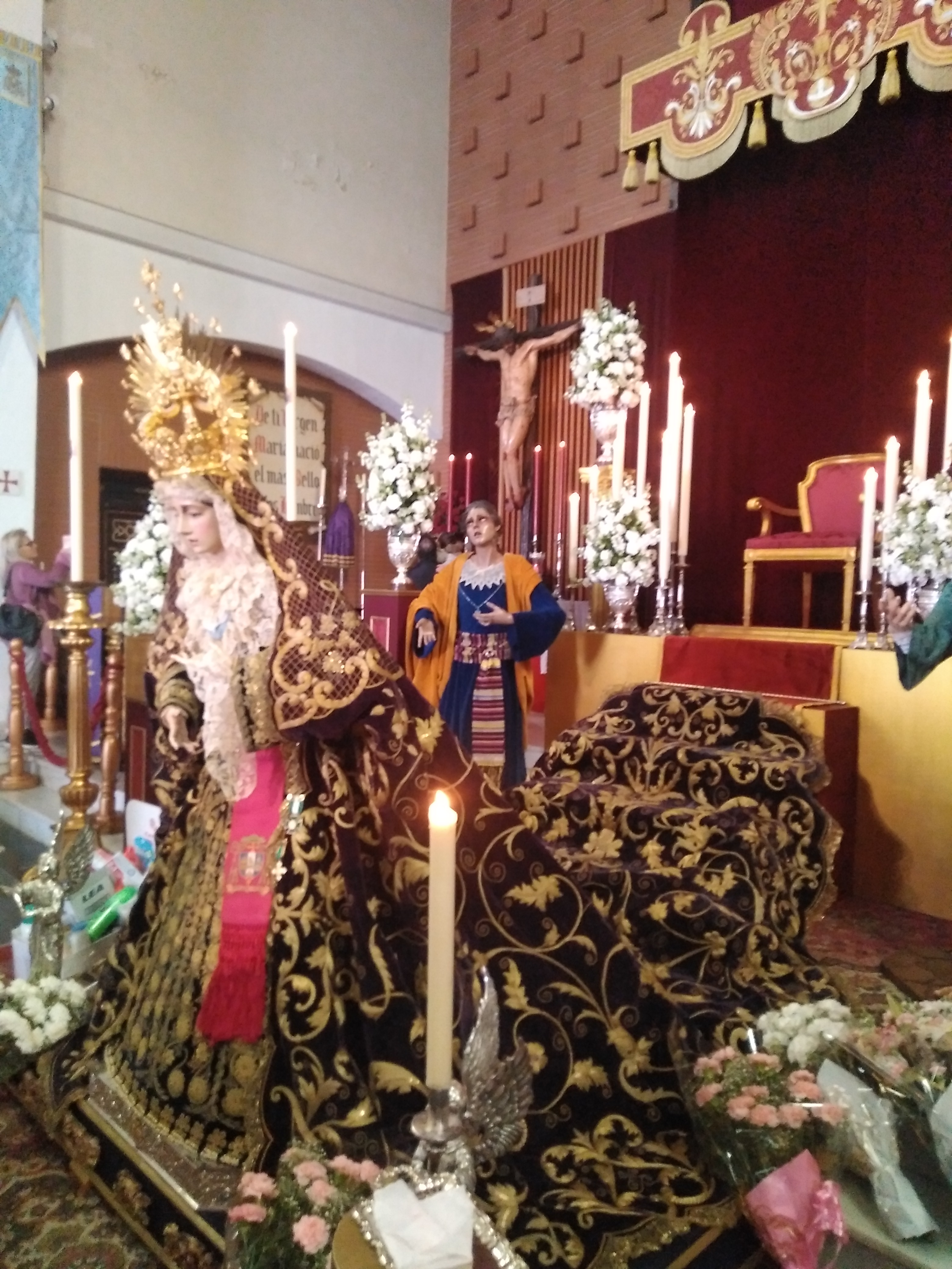 Parroquia de Las Viñas en Jerez de la Frontera (España)